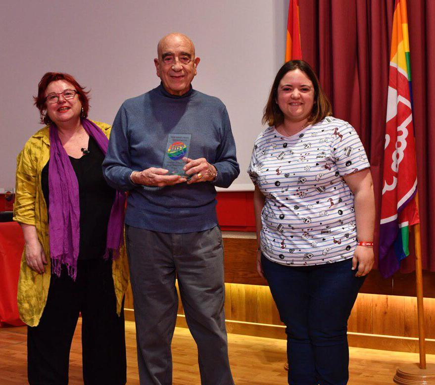 Entrega del premio UGT 17 de mayo a las libertades públicas y derechos civiles